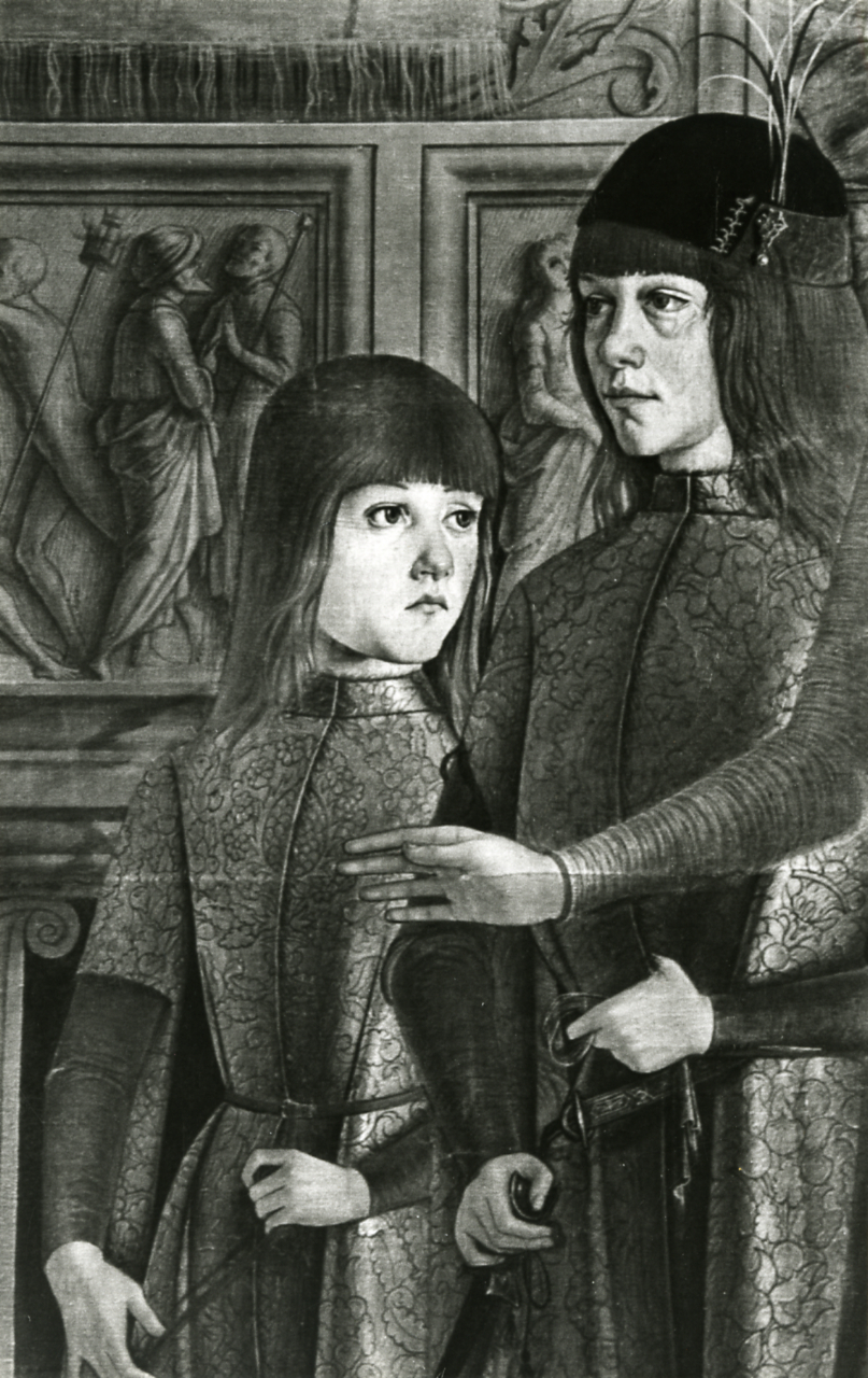 Servizio fotografico : Bologna, 1982 / Paolo Monti. - Stampe: 4 : Positivo b/n, gelatina bromuro d'argento/ carta, 24x30. - ((Al verso delle stampe manoscritti i numeri dei negativi corrispondenti (formato 35 mm) con indicazione del fotogramma: 4003/3, 4003/7, 4003/4[tagliato], 4003/[tagliato]; iscrizione didascalica [errata] manoscritta a matita; timbro a inchiostro con copyright (Corso Sempione - Milano). - Sul coperchio della scatola iscrizione didascalica manoscritta a pennarello nero: "Pittura". - Occasione: Documentazione dei dipinti e affreschi restaurati. - Fonte: Agenda di Paolo Monti: Nikon Leika 3001-/ Monti 1978 (1978-1982), presso Archivio Paolo Monti. - Fonte: Fattura di Paolo Monti: IV. Commesse/ Fattura n. 12/ Fotografie di quadri e affreschi restaurati (1982/06/29), presso Archivio Paolo MontiFattura di Paolo Monti: IV. Commesse/ Fattura n. 12/ Fotografie di quadri e affreschi restaurati (1982/06/29), presso Archivio Paolo Monti di Paolo Monti: IV. Commesse/ Fattura n. 12/ Fotografie di quadri e affreschi restaurati (1982/06/29), presso Archivio Paolo Monti